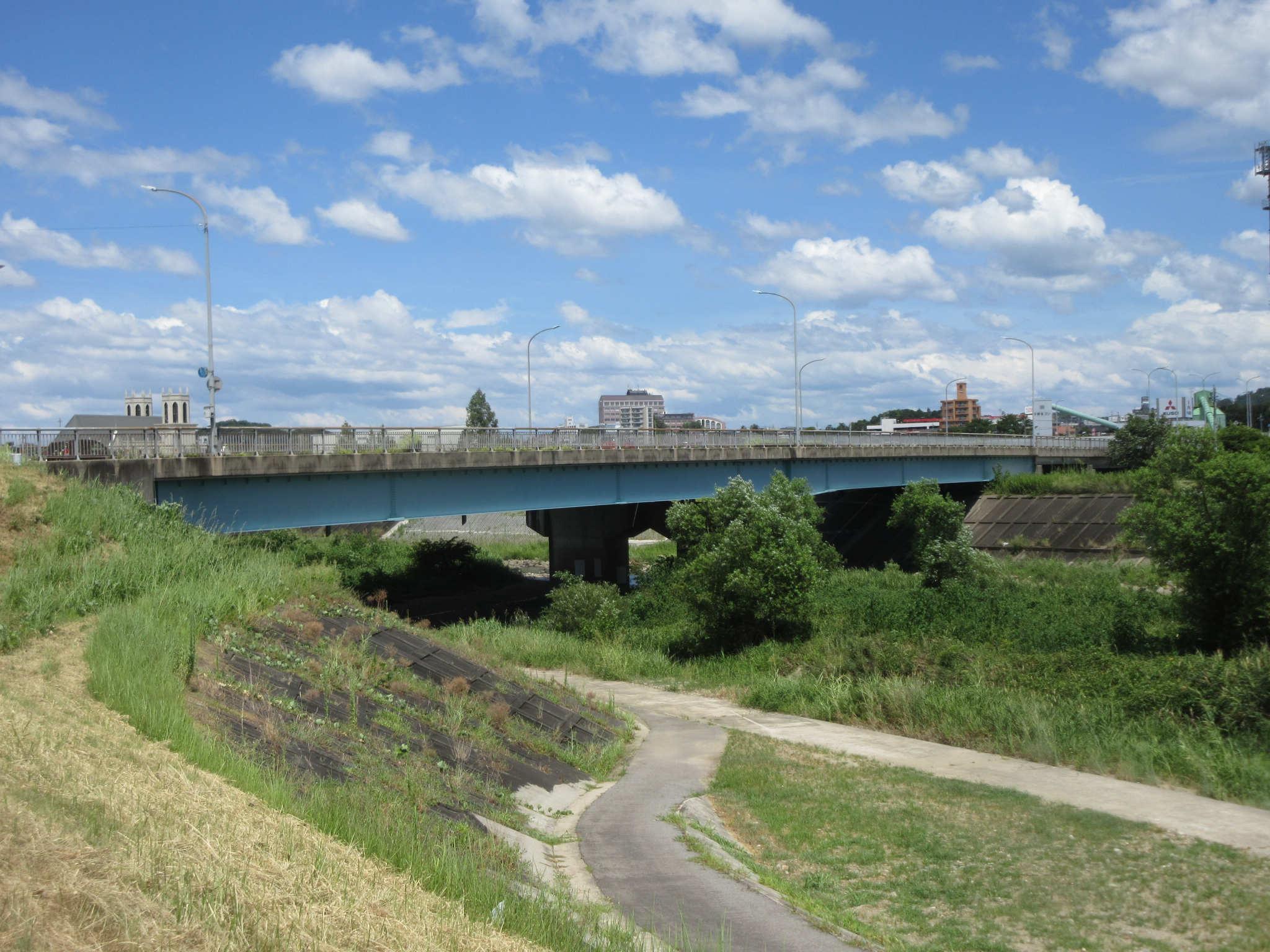 乙川にかかる「乙川大橋」